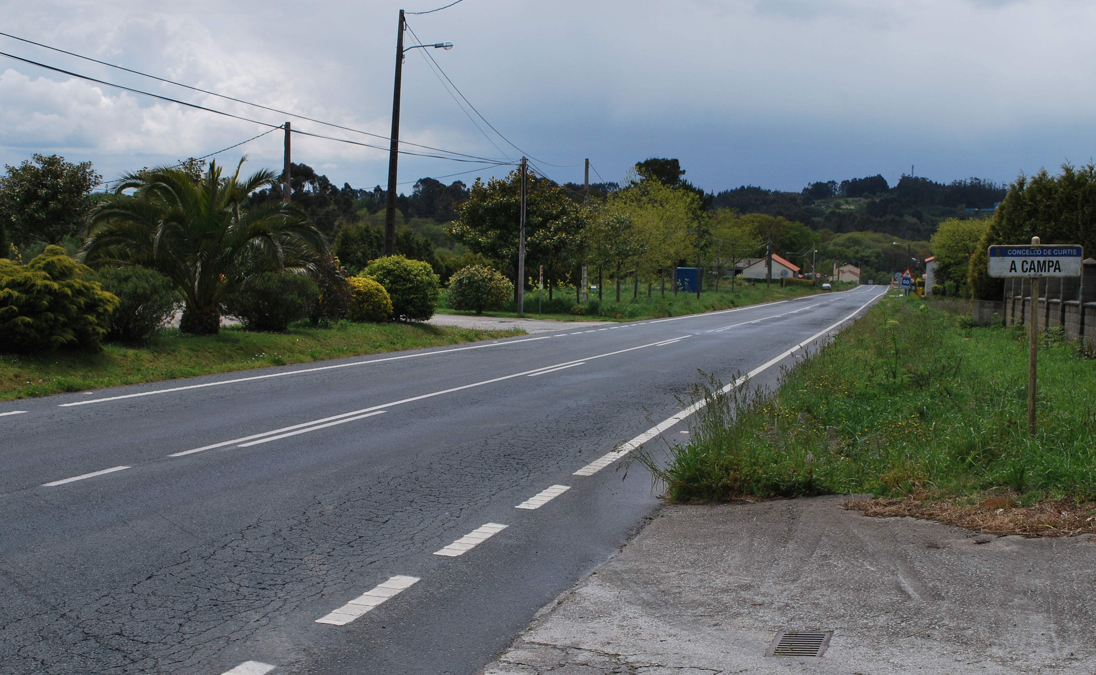 Vista da estrada AC-230 Curtis Montesalgueiro A Campa Fisteus Curtis A Coruña Galiza Spain